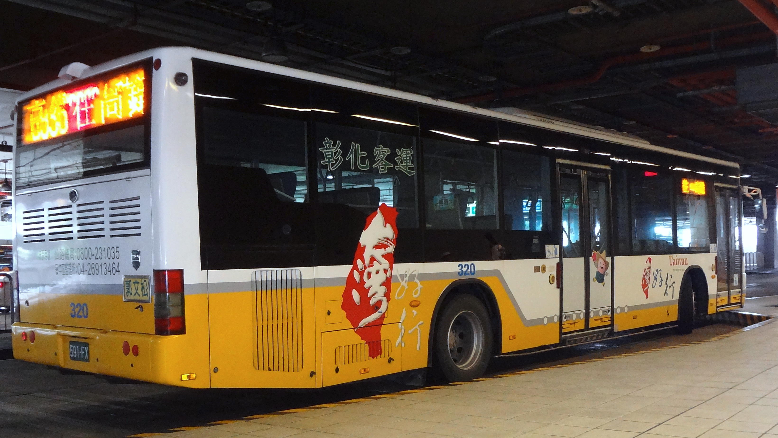 彰化客運台灣宇通ZK6128HGA大客車591-FX，台灣好行塗裝，停在台灣高鐵台中站。